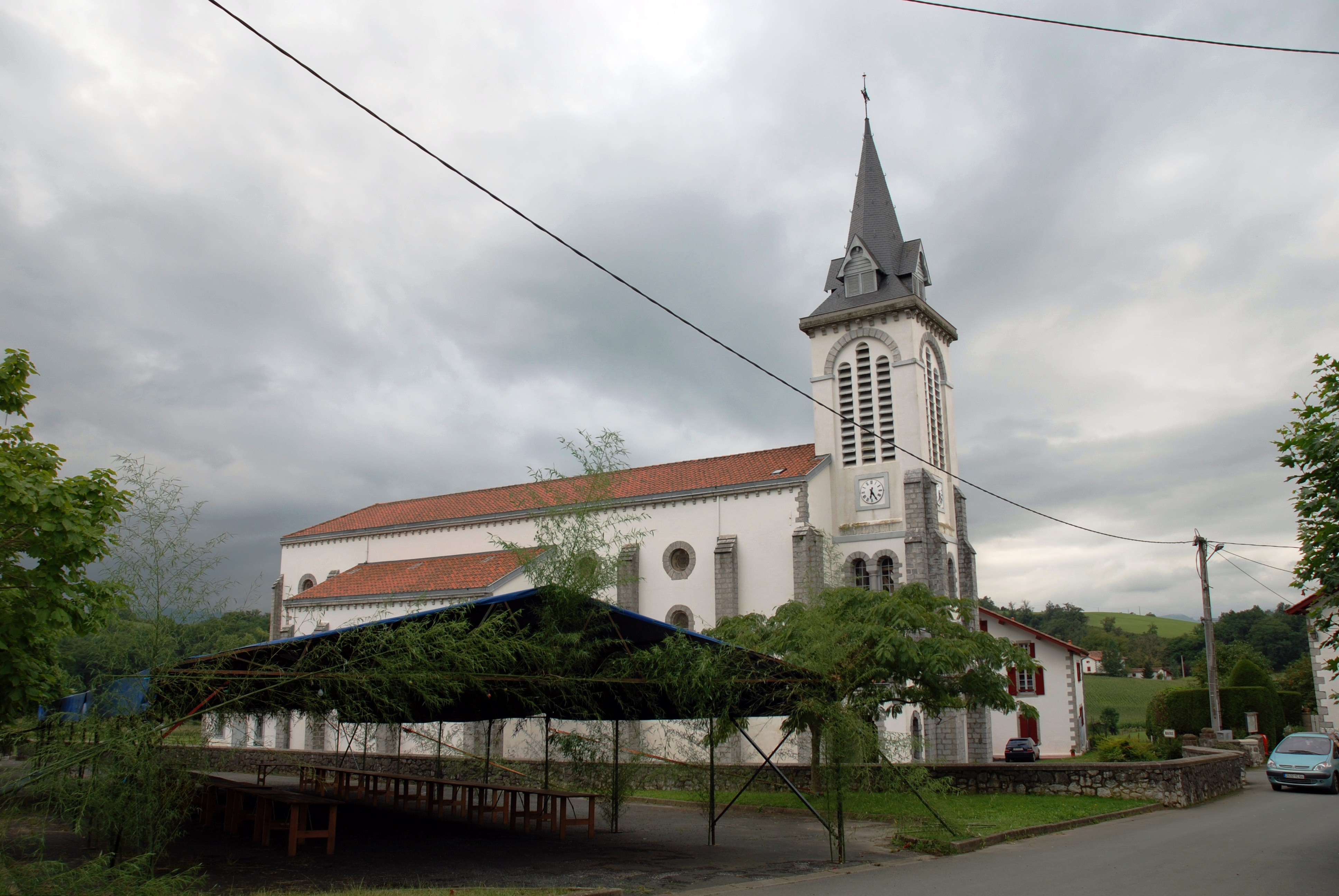 Jaxu, l'église Saint-François-Xavier